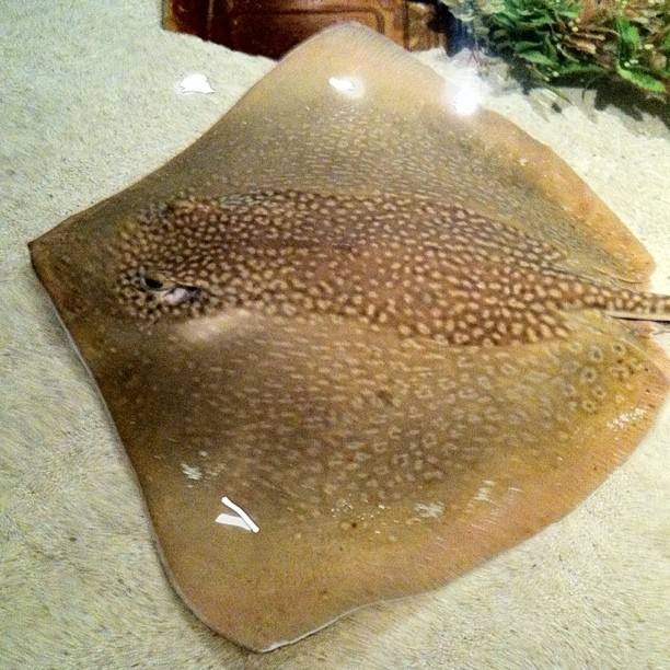 Himantura gerrardi at Mandalay Bay